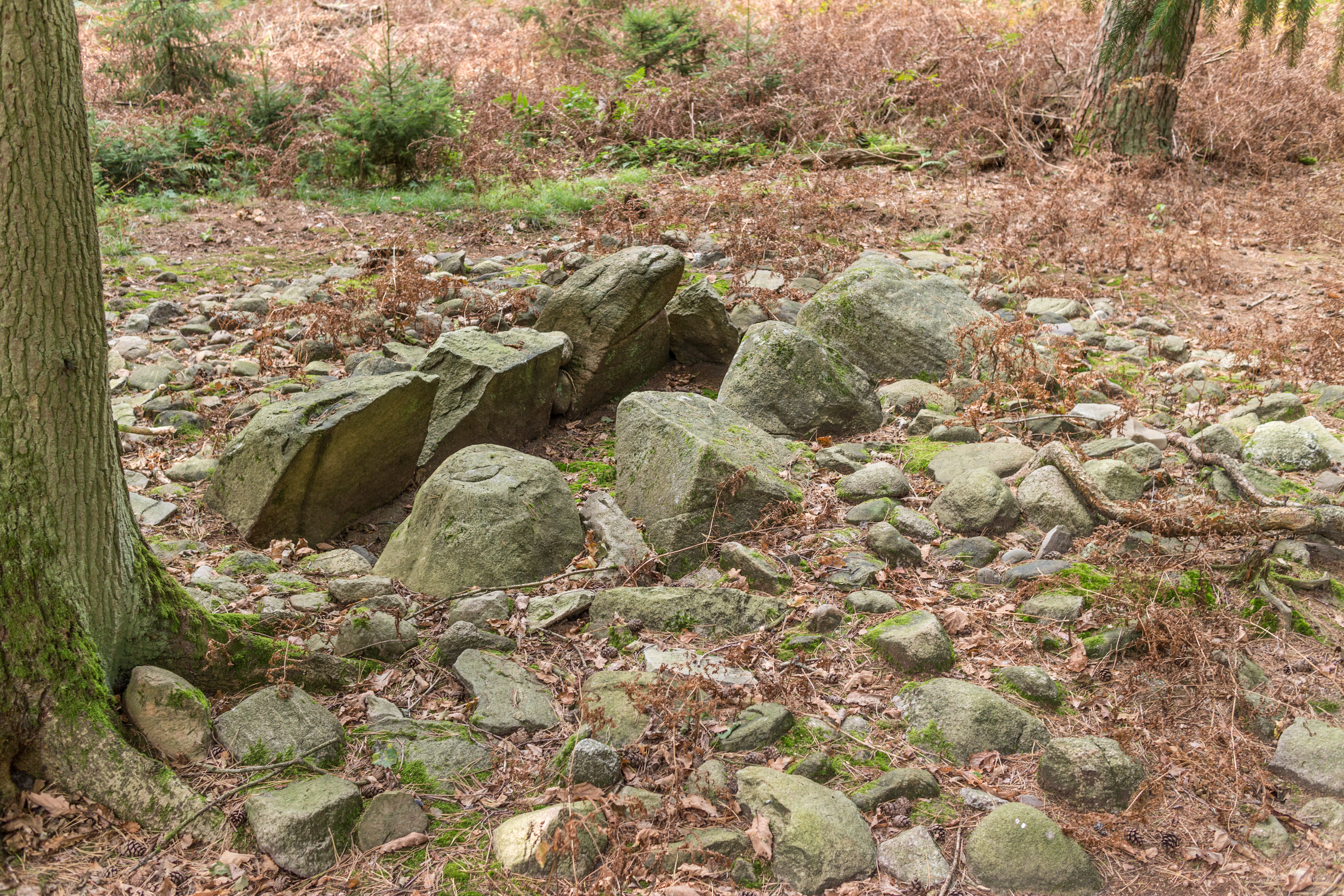 Steinkiste in der Feldmark Rade und nähere Umgebung